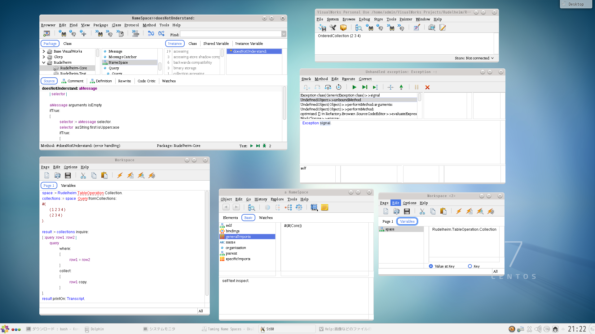 Smalltalkの参考用画像。CentOS上で稼働するVisualWorks。